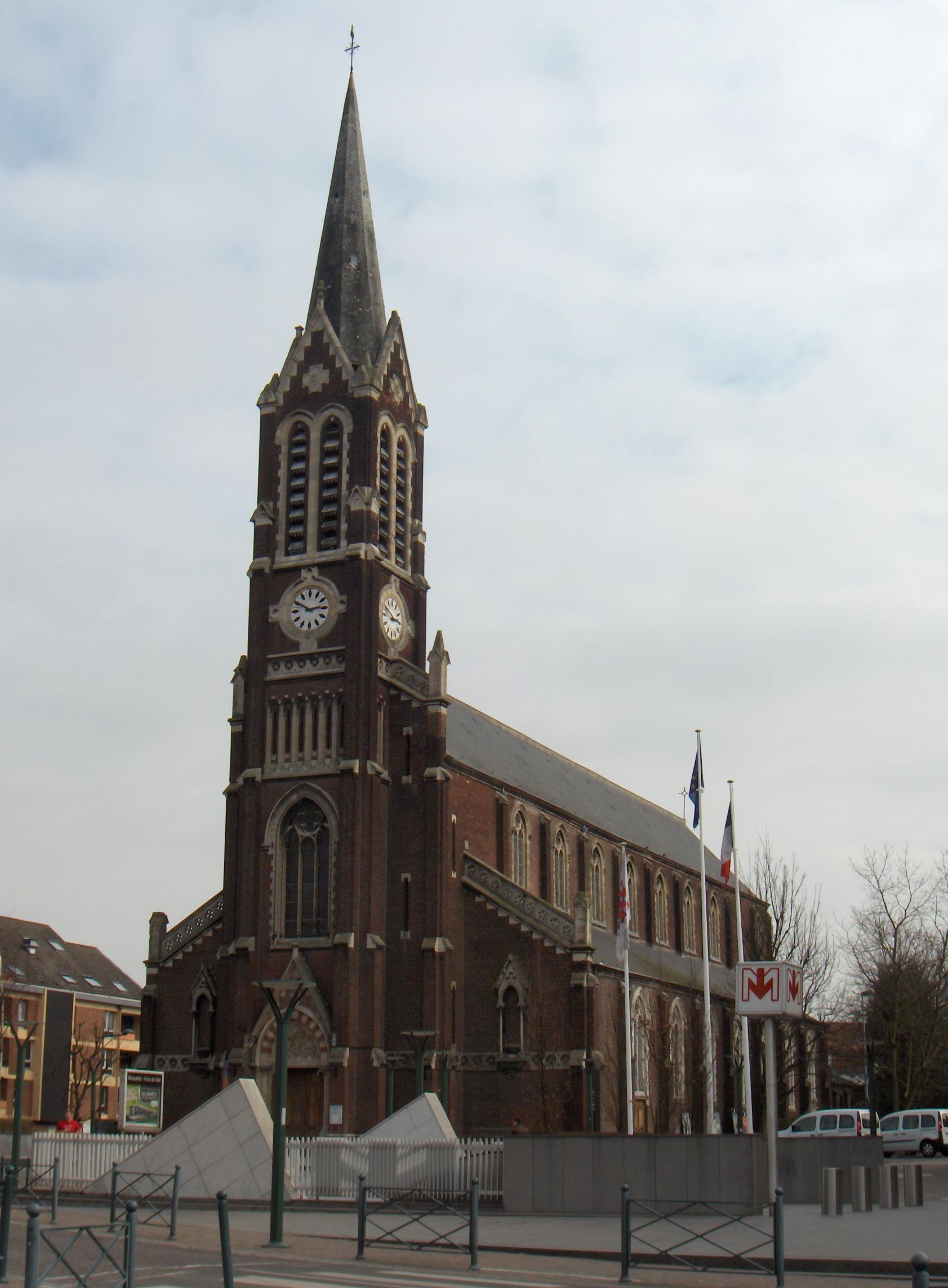 Wasquehal (France, dépt. Nord): église Saint-Nicolas (XIXe siècle)